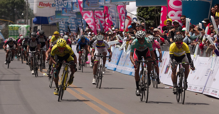 Eta3. Vuelta a Colombia 2015 Martes 4 de agosto de 2015. Paipa - Cota (172Kms)